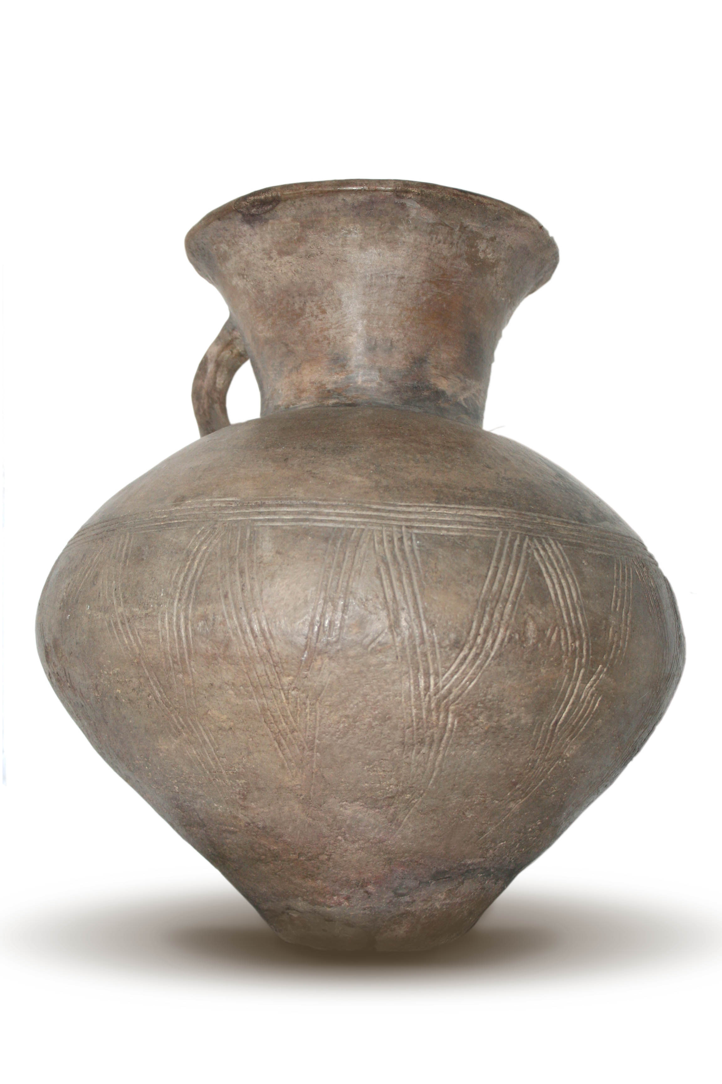 Kerámia a neolitikum idejéből, Kr. e. 3500 körül, Közép-Magyarország